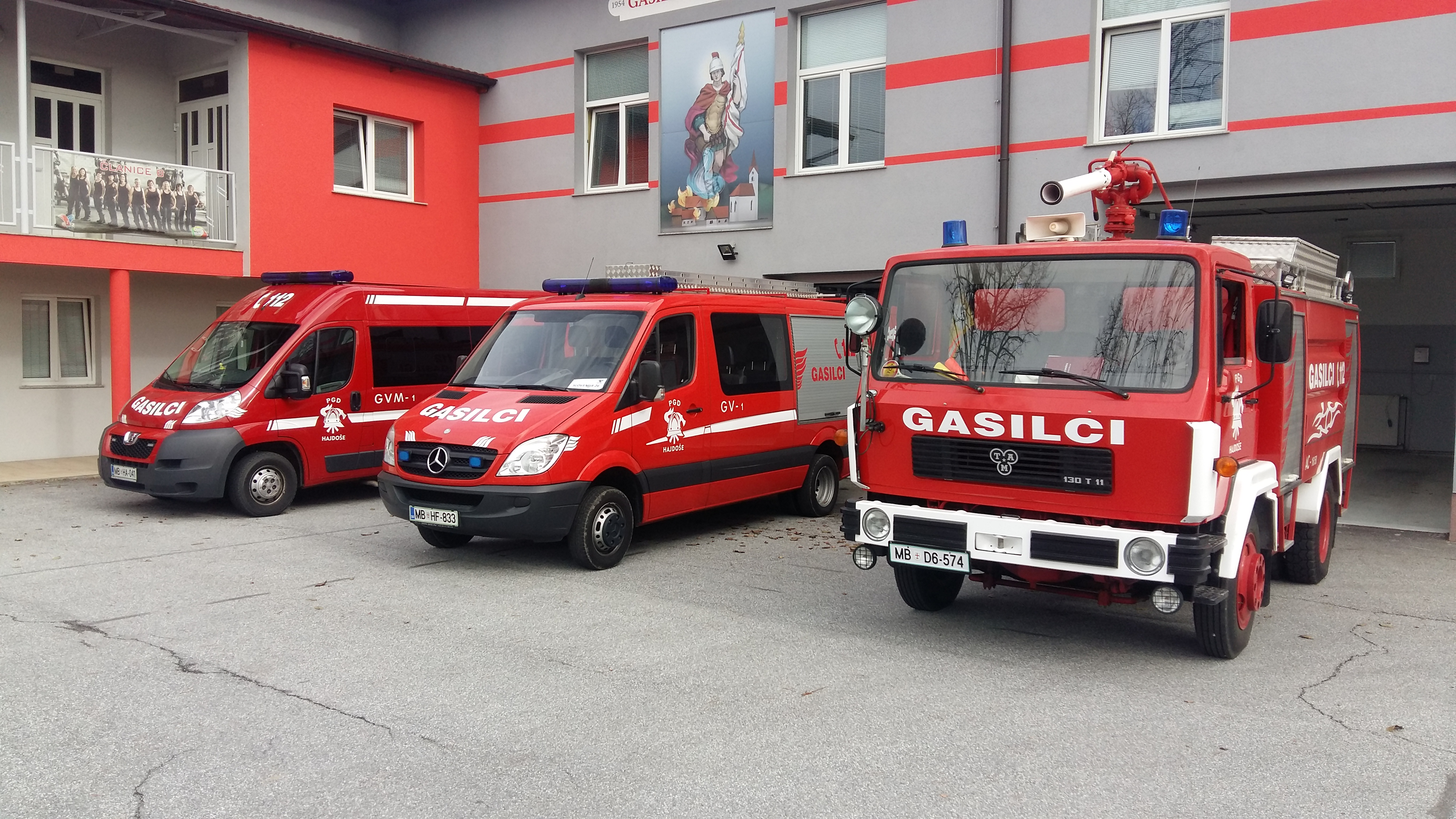 Vozni park